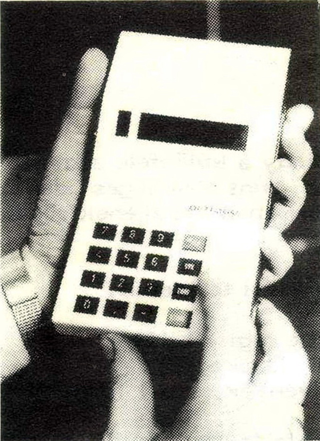 1981-ben készült hordozható adatrögzítő (Gyarmati-Pék szabadalom).